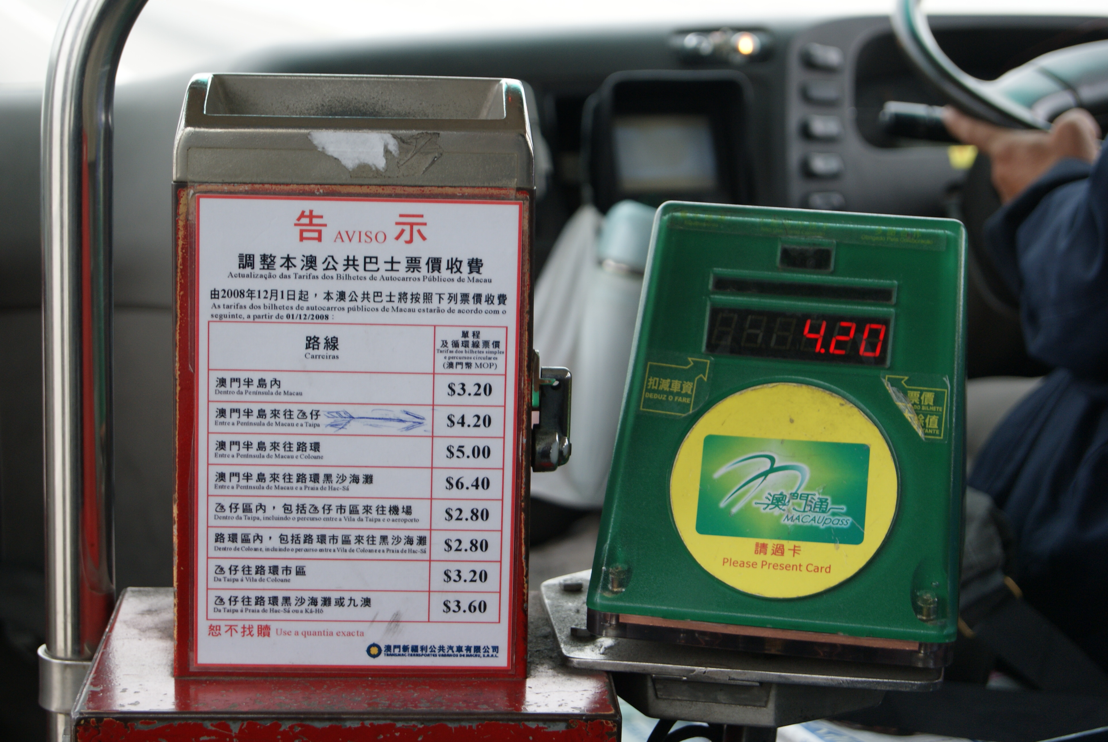 2011年8月1日新巴士服務模式開始前，使用的舊款澳門通機。